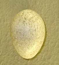 Garrulus glandarius's egg